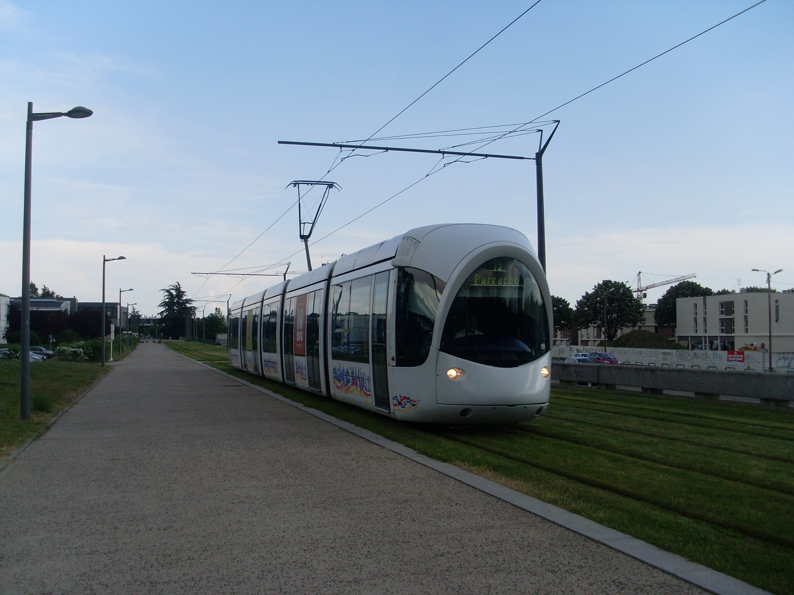 Alstom Citadis 302 - Tramway de Lyon - Ligne T2 - Parilly-Université-Hippodrome